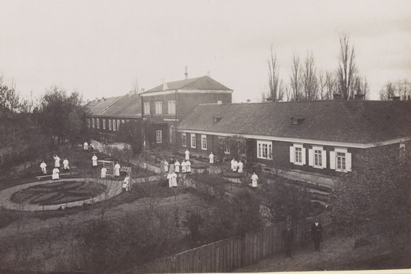 Беларуская (тарашкевіца): Парычы (Paryčy), сядзіба Пушчынаў (Puščyn). Жаночая духоўная вучэльня